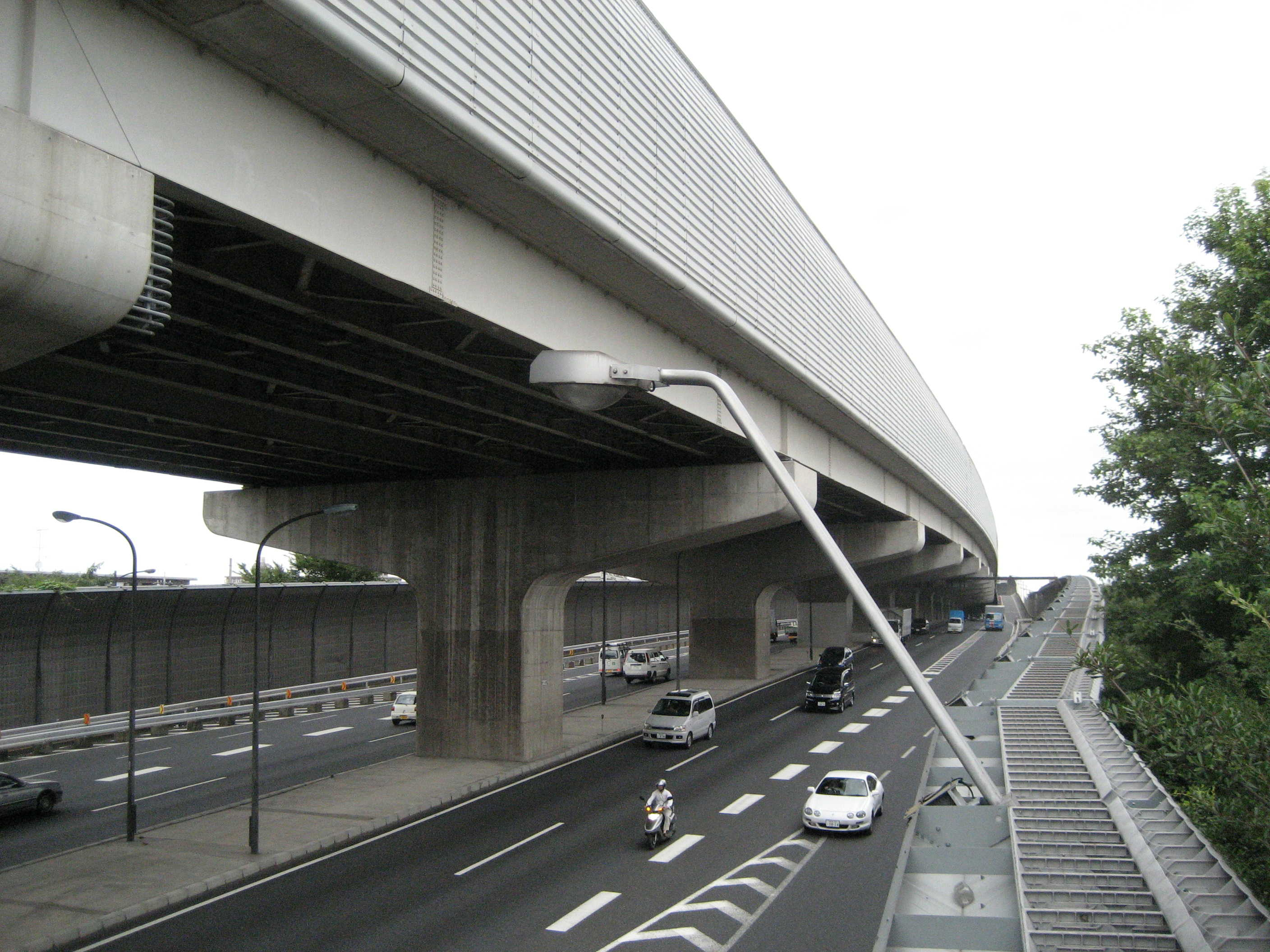 外環と298号, 車 = トヨタ セリカ ST202